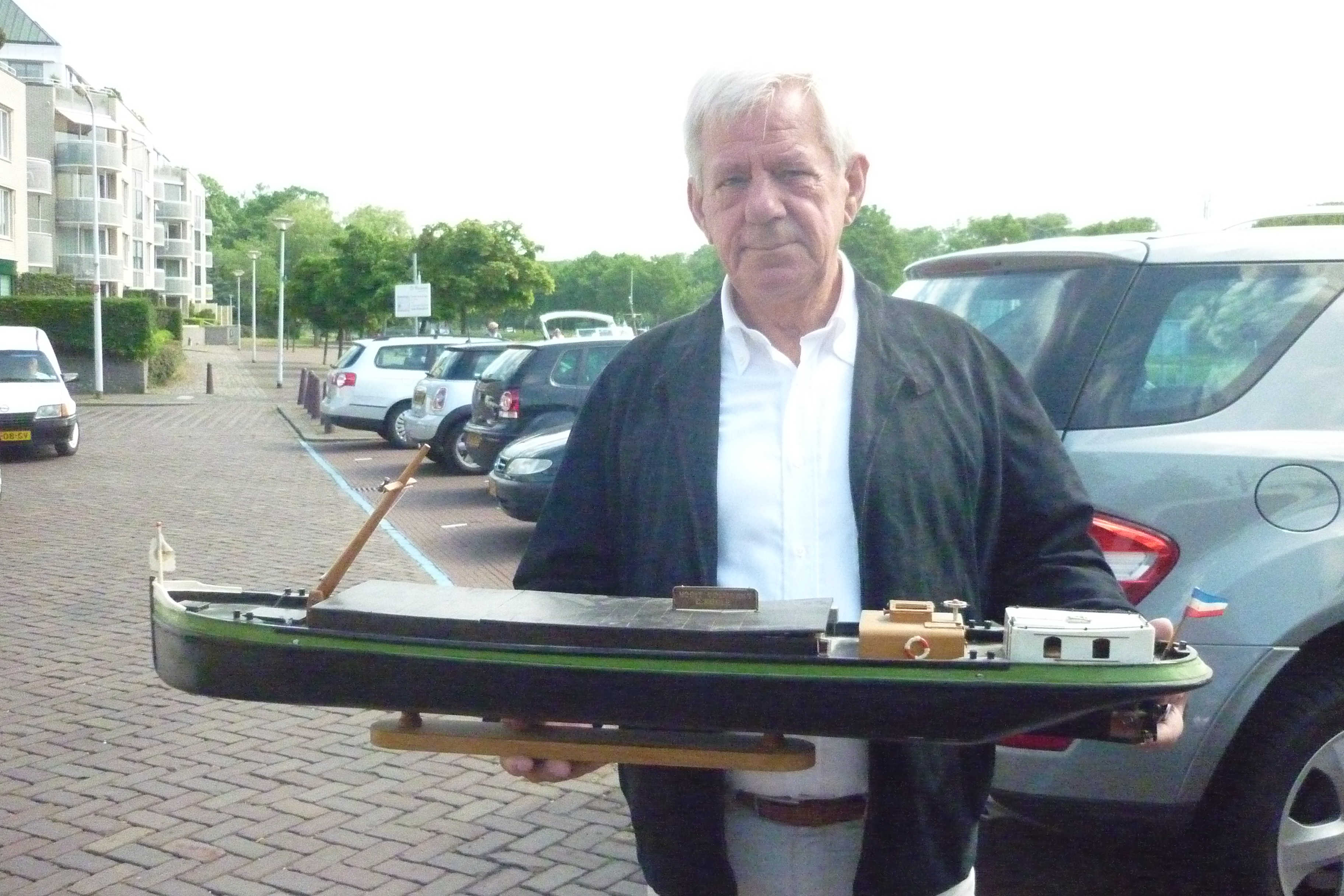 Nooit Volmaakt, model van schip van Kees Koole, waarmee hij Engelandvaarders hielp.